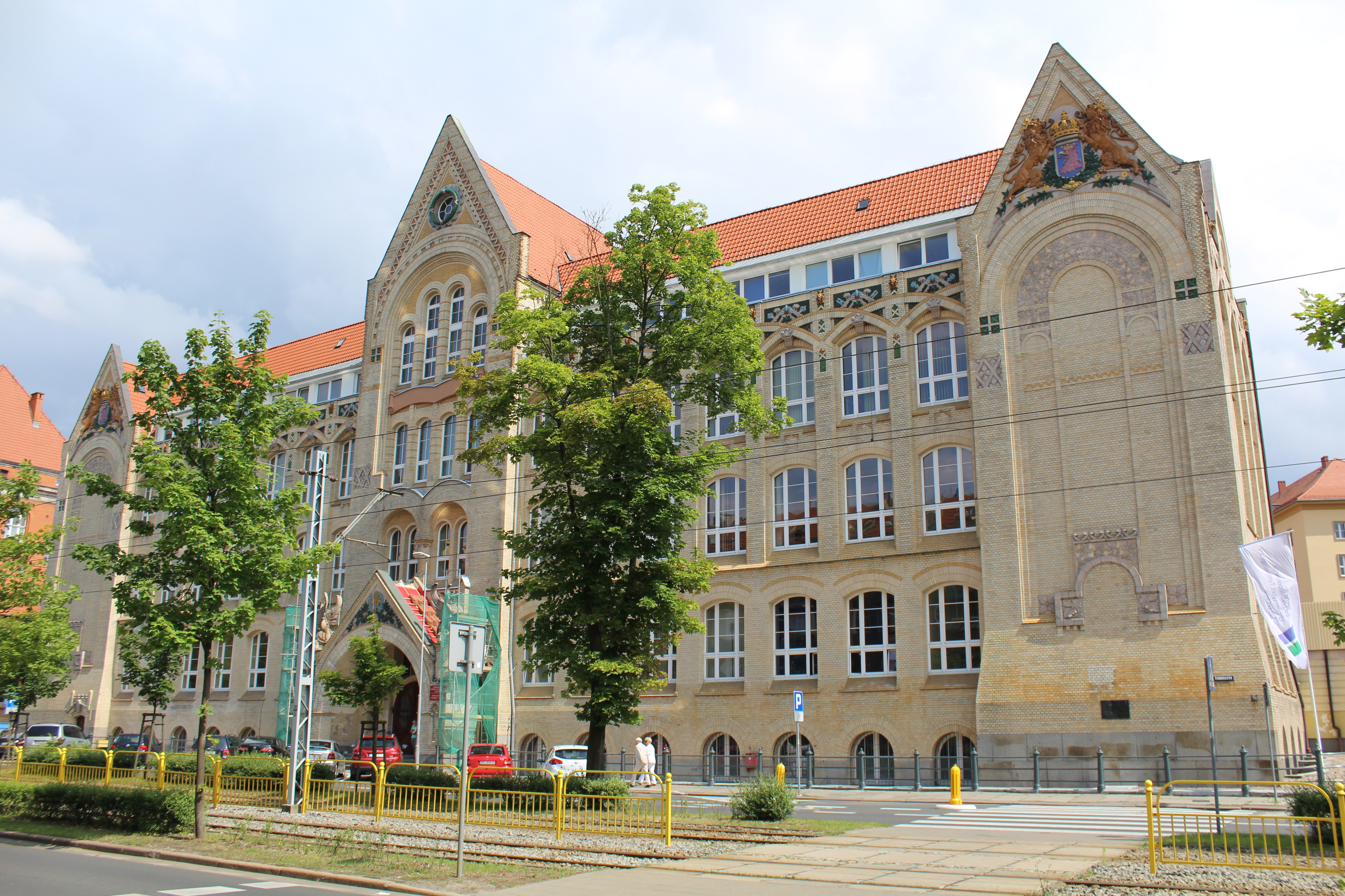 Szczecin, Królewska Szkoła Budowy Maszyn, ob. Wydział Elektryczny ZUT Wikidata has entry Q33306044 with data related to this item.